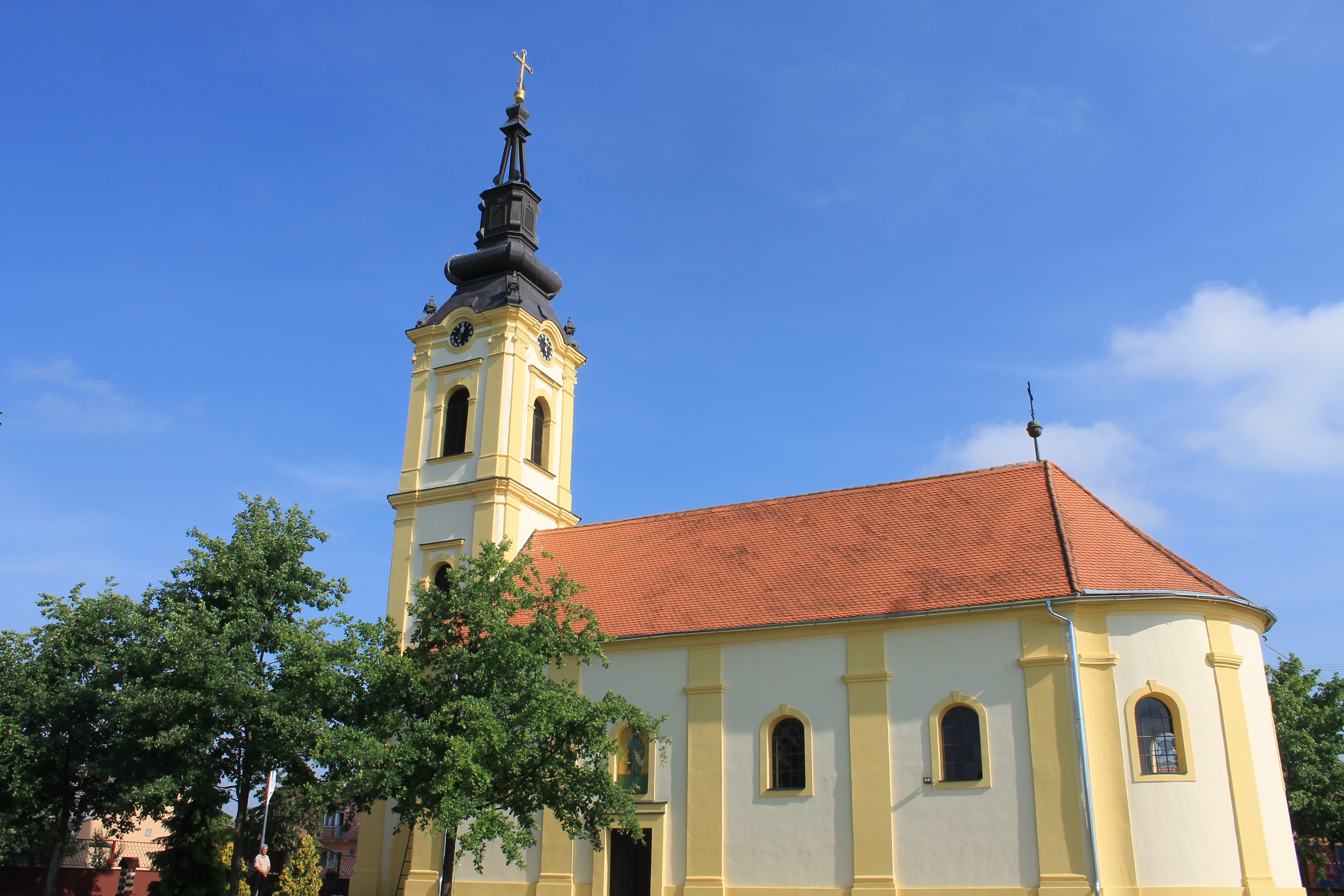 Crkva Sv. Nikole (Bačinci)